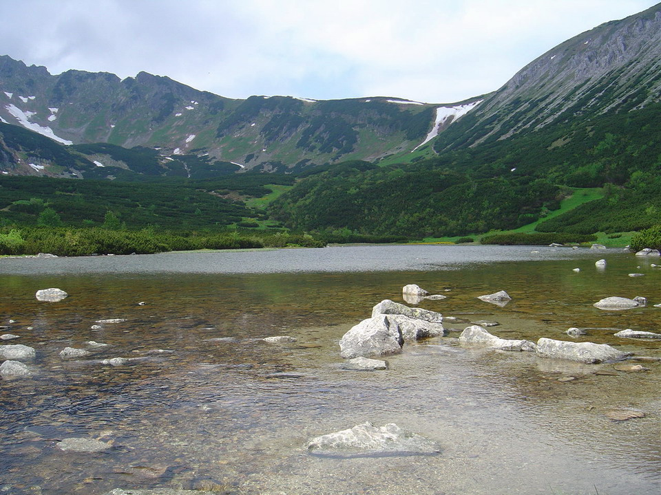 Predne Kopske sedlo over Velke Biele pleso